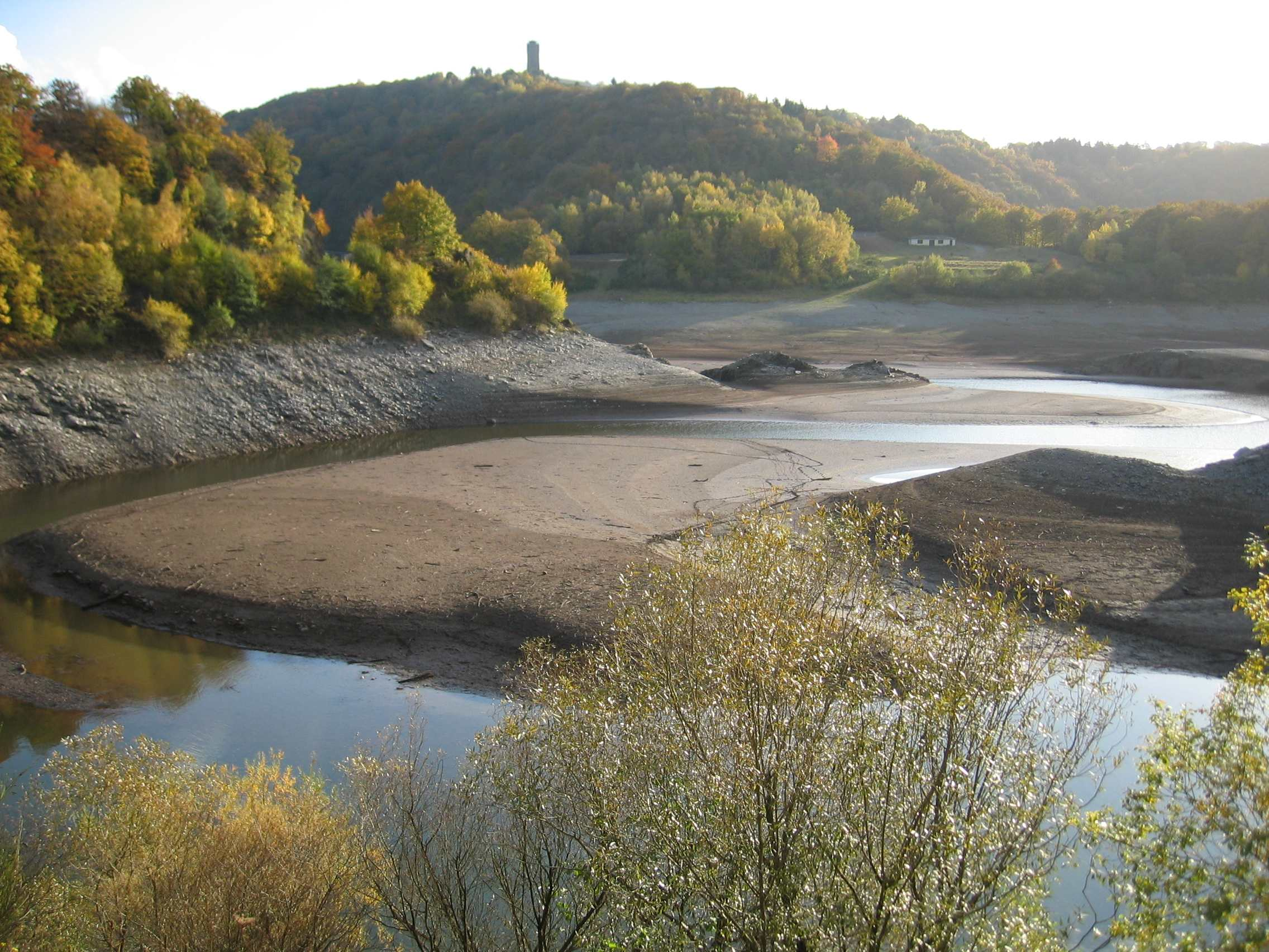 Urftstausee im Nationalpark Eifel unterhalb Burg Vogelsang